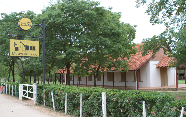 Museo de la ciudad de Neuland